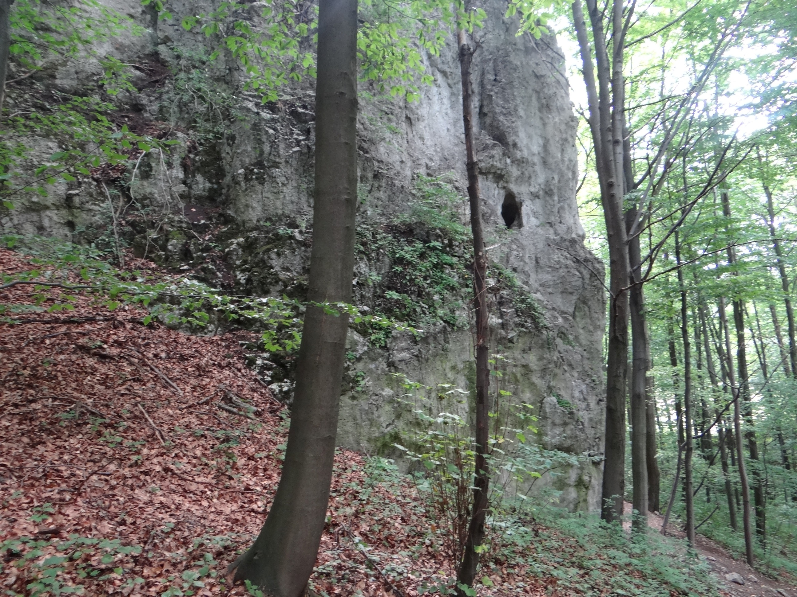 Północna ściana Organów w Wąwozie Ostryszni. Widoczny północny otwór Tunelu z Progami.